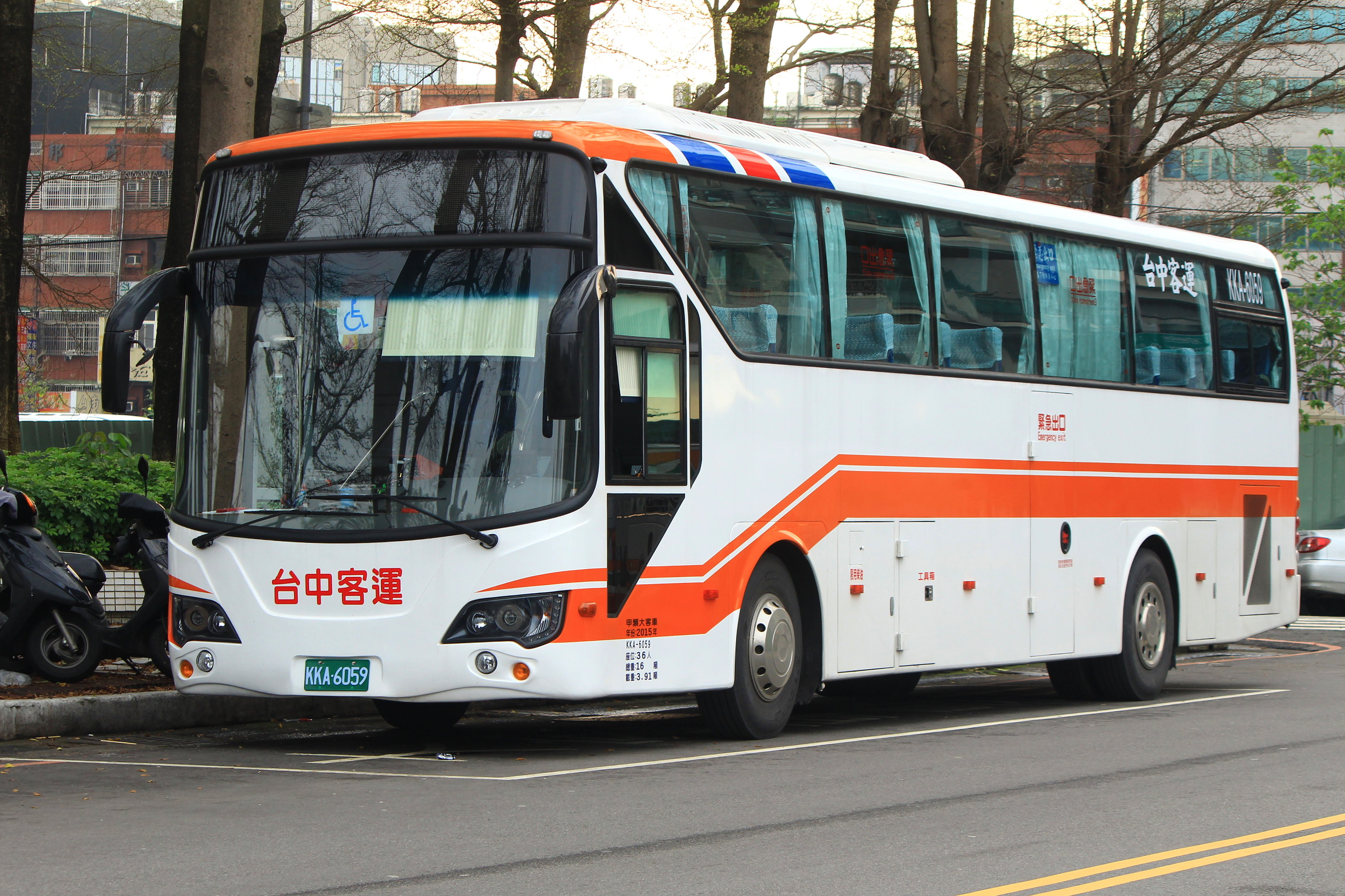 中文（台灣）: 台中客運2015年日野RN8JSVU-SSF大客車KKA-6059，干城休息中。